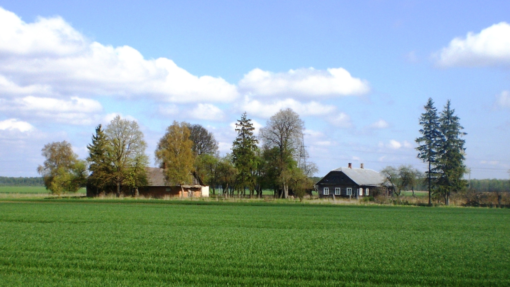 Kazokai, Panevėžio raj.